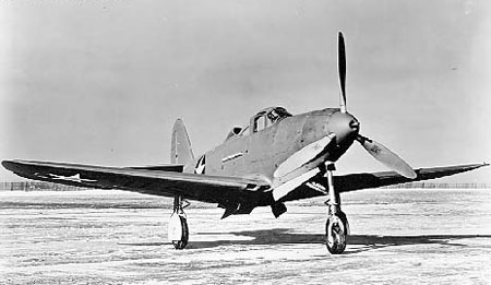 A USAAF P-39 Airacobra fighter, circa 1942.